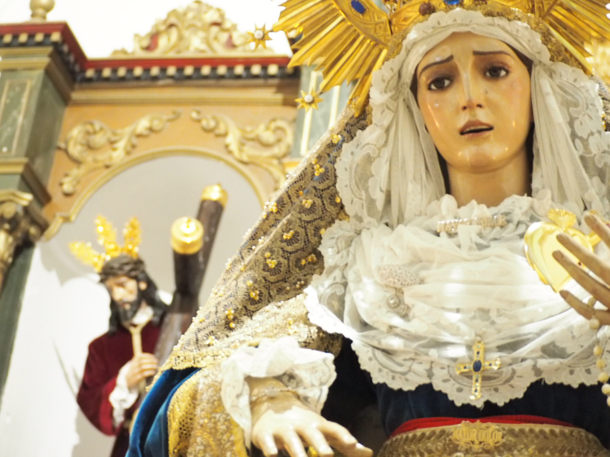 María Santísima del Mayor Dolor durante su Besamanos en 2019, detrás Nuestro Padre Jesús del Amparo